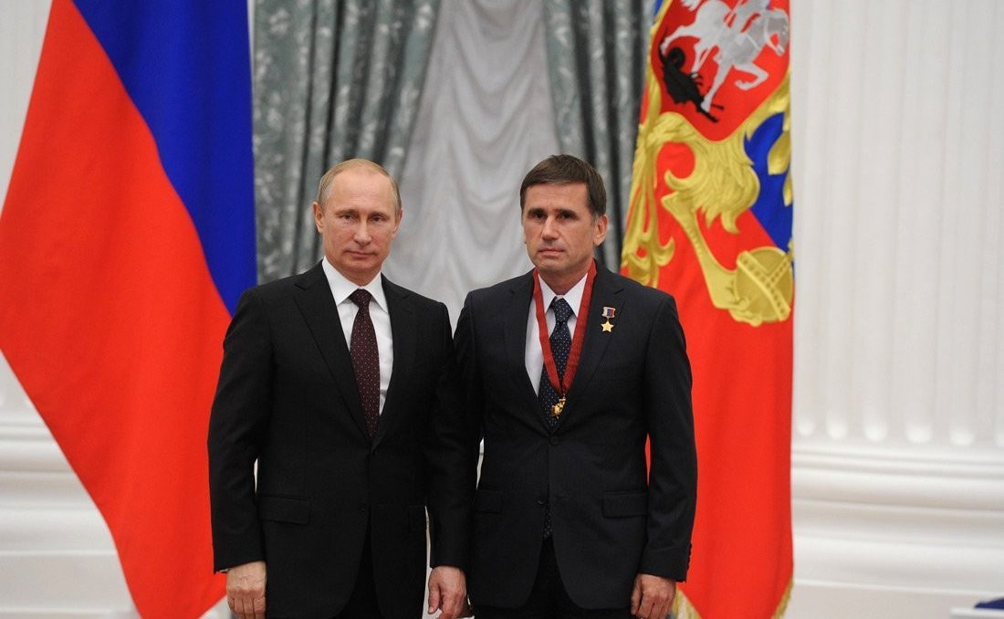 Орденом «За заслуги перед Отечеством» III степени награждён Юрий Маленченко